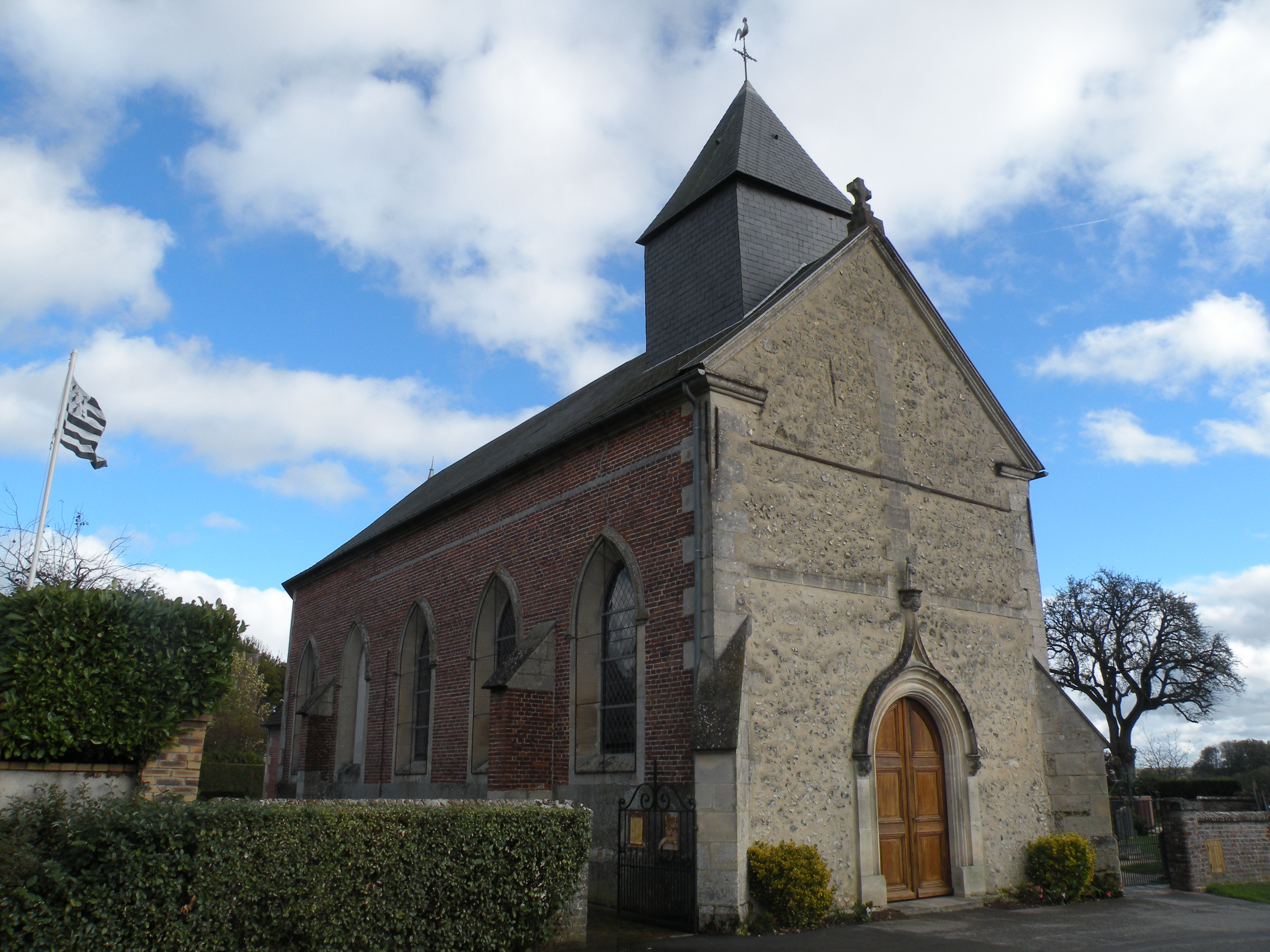 Novillers-les-Cailloux église